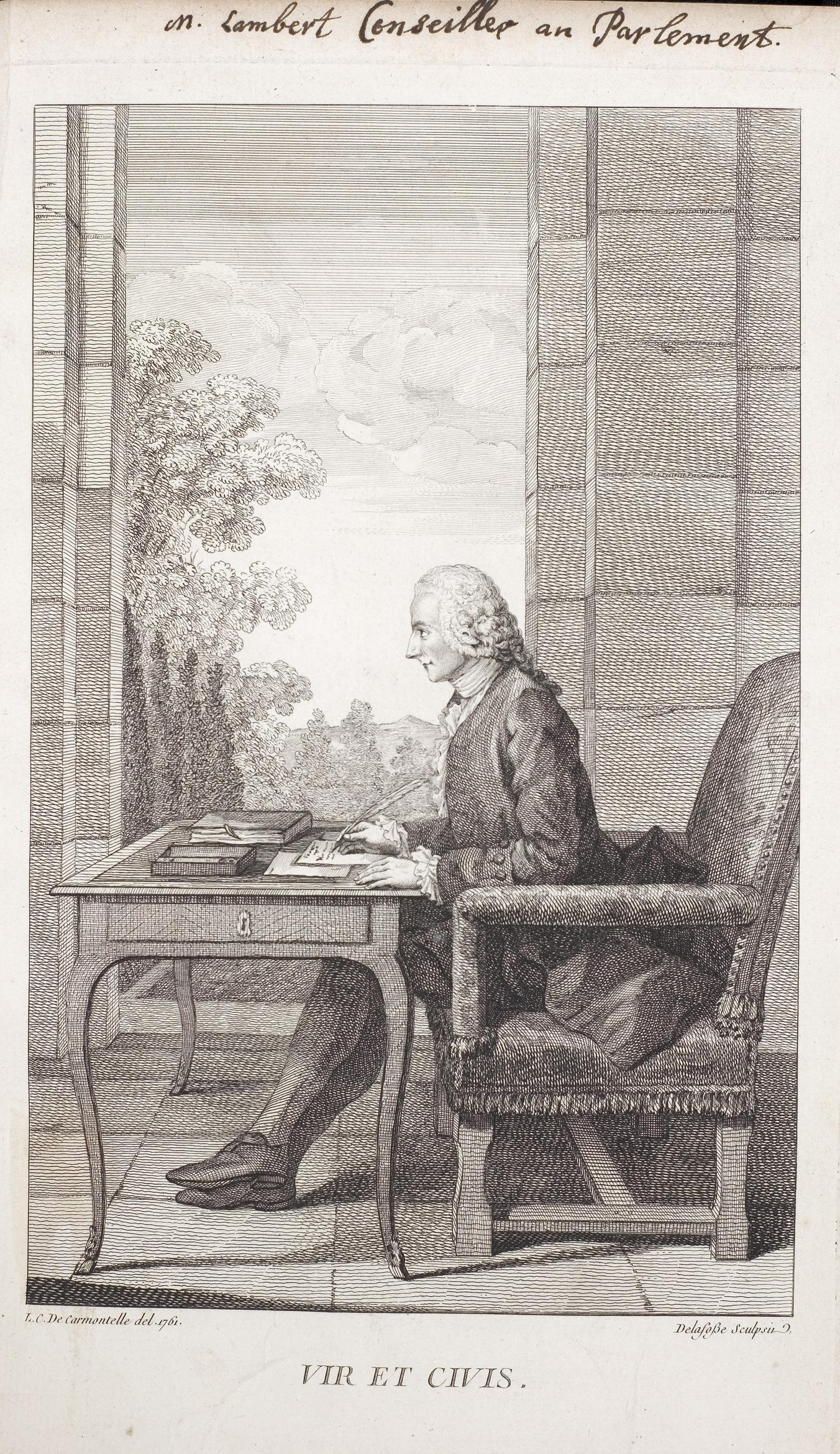 Grafik aus dem Klebeband Nr. 14 der Fürstlich Waldeckschen Hofbibliothek Arolsen Motiv: (handschriftlich:) "m. Lambert Conseiller au Parlement" (= Claude Guillaume Lambert ?) "Vir et Civis"